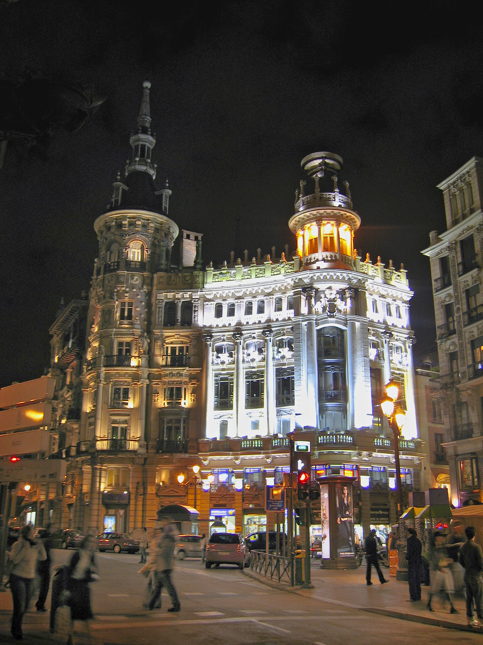 2006. Plaza de Canalejas